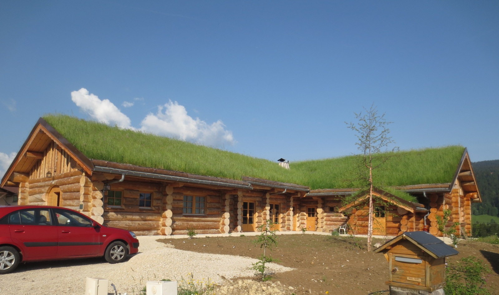 Toiture végétale dans le Haut Jura - France